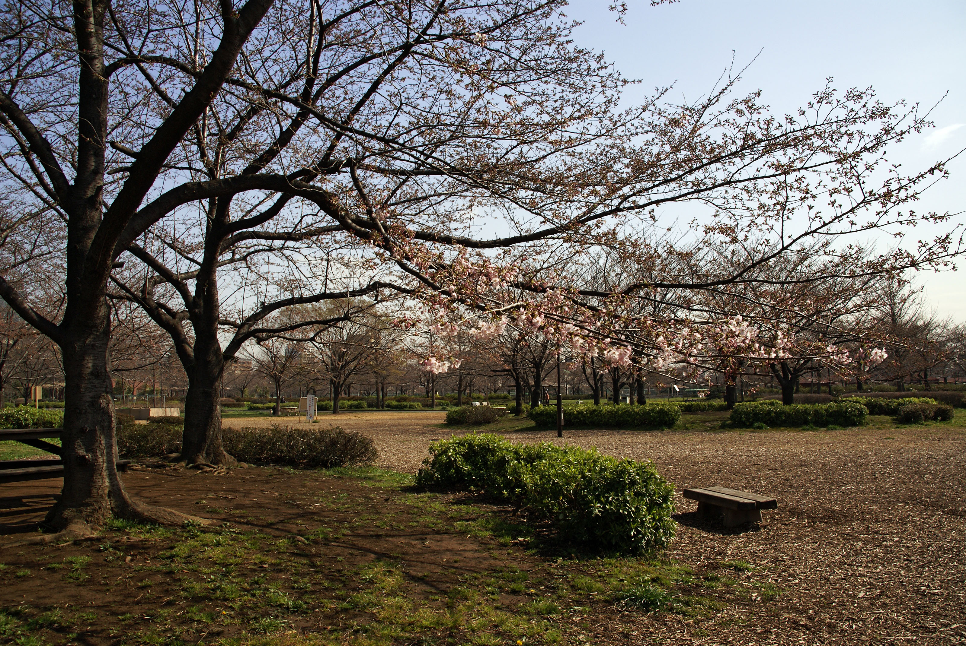 Sarue park in Koto-ku, Tokyo, Japan